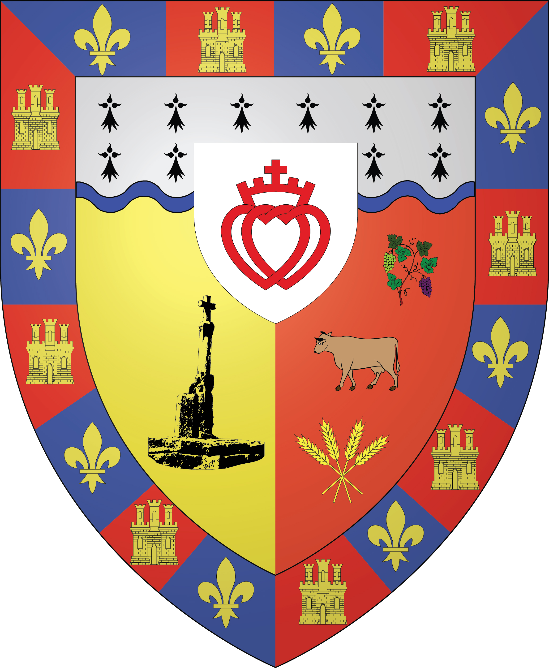 shield of La Chapelle Thémer (Vendée)